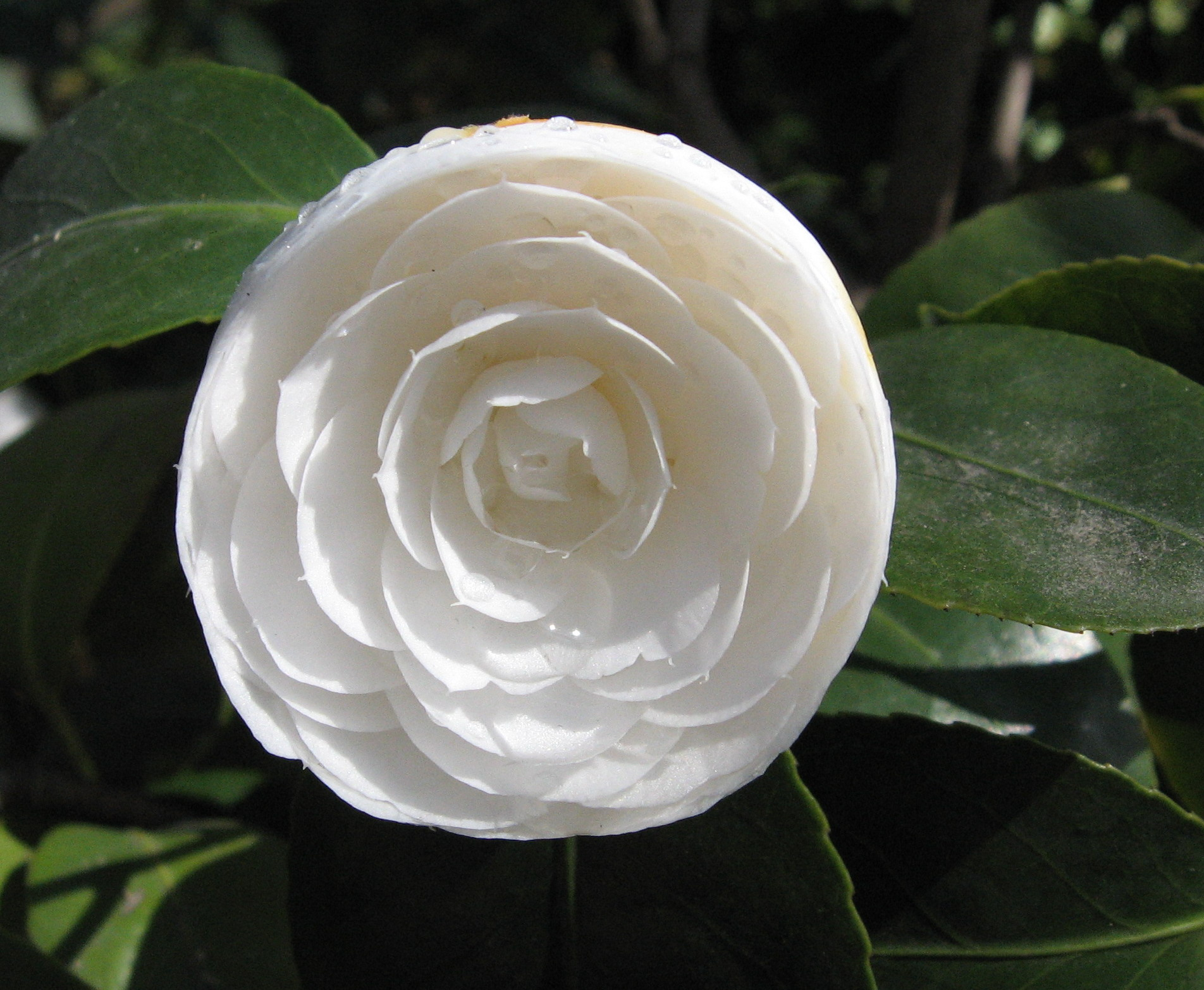 Camellia 'Duchesse de Berry'. Real Jardín Botánico, Madrid, España.